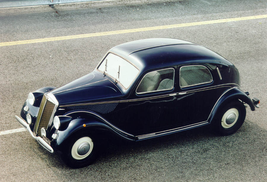 Vettura Lancia Aprilia del 1937 (Fiat Group Marketing & Corporate Communication spa, Archivio e centro storico Fiat, Archivio iconografico, Lancia)